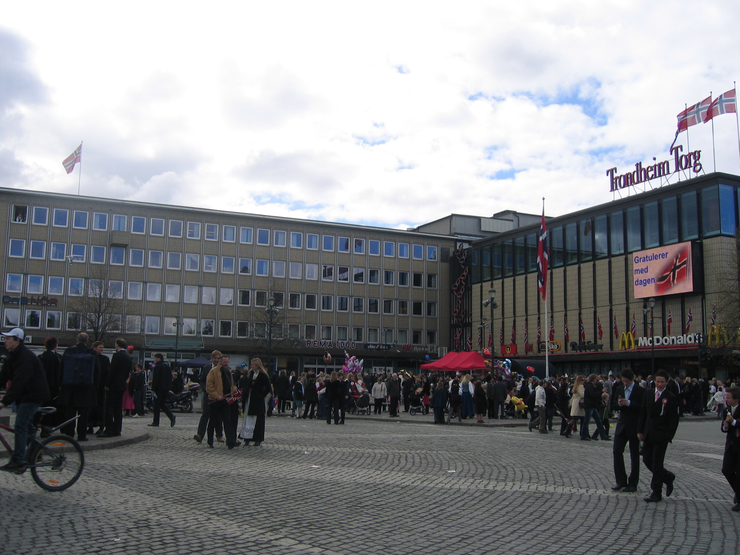 Trondheim Torg in Trondheim, Norway.